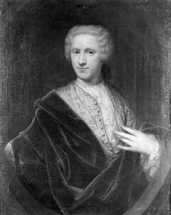 Portret van Jacob Carel Martens